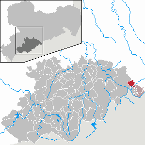 Heidersdorf im Erzgebirgskreis, Sachsen